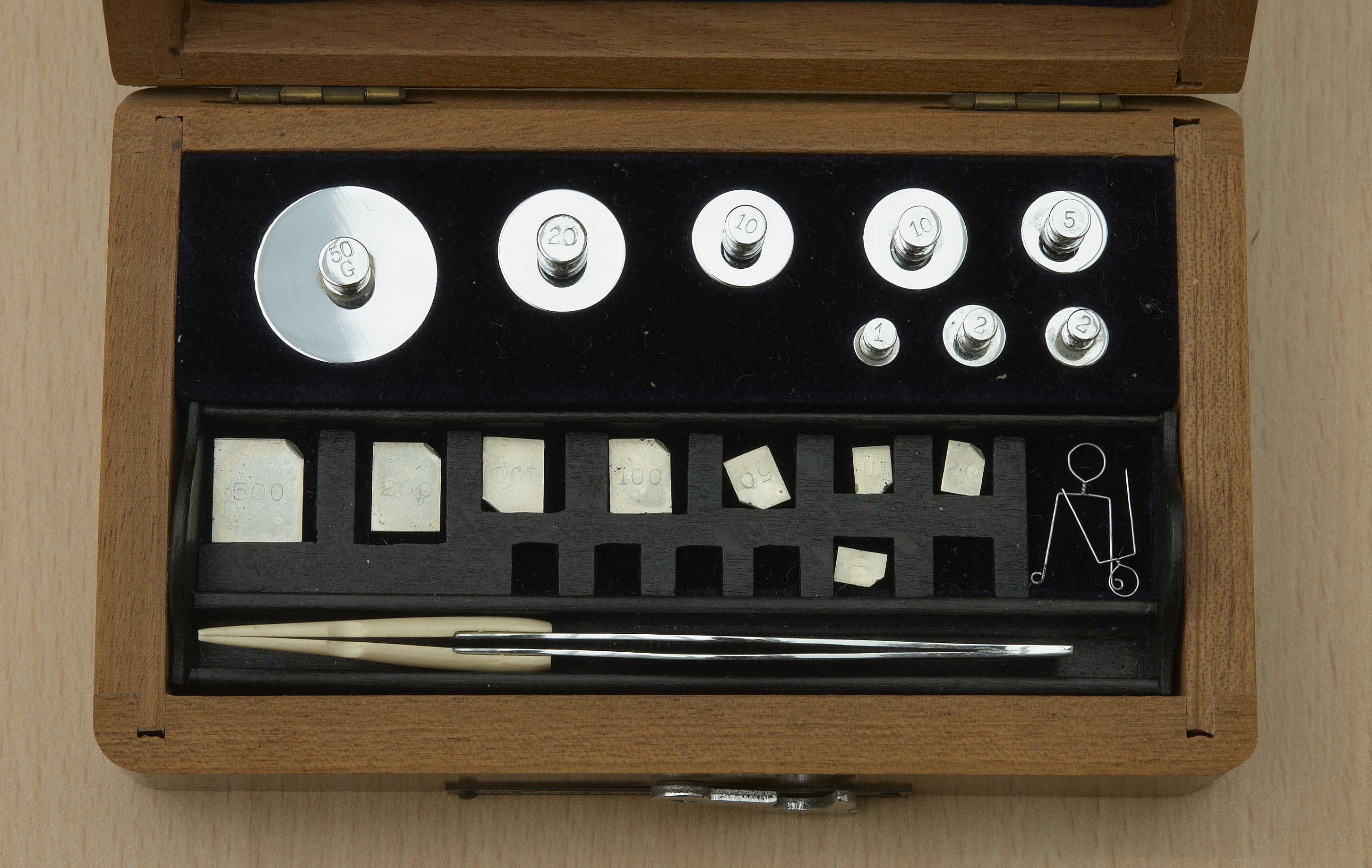 Gewichtendoos met gewichten van 50, 20, 10, 5, 2 en 1 gram en milligramgewichten